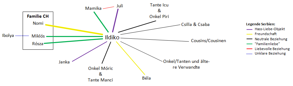 Figurenkonstellation der Figuren aus Serbien aus Melinda Nadj Abonji's Roman "Tauben fliegen auf"